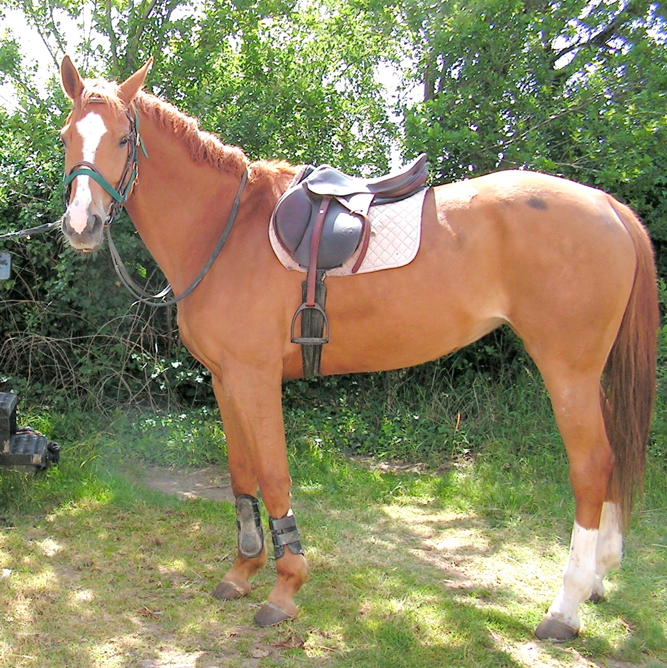 Kaline de Faye, jument Selle français, Saivres (79), France